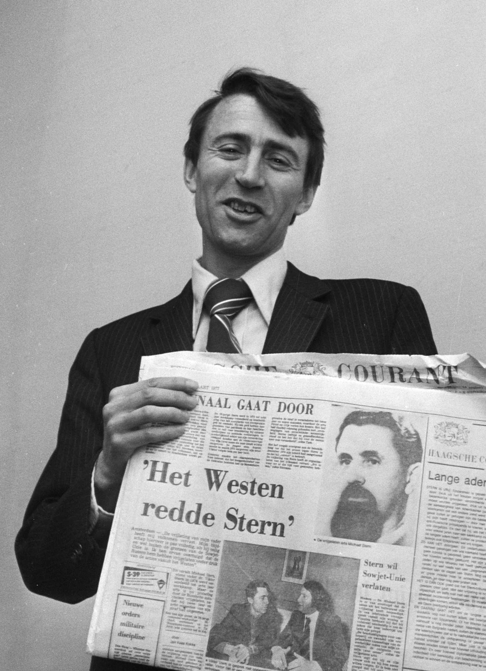 Victor Stern (zoon van de Russische arts Michail Stern) met een krant met het bericht over de vrijlating van zijn vader in de USSR